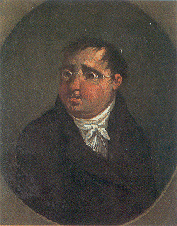 J.F. Helmers (1767-1813); schilder onbekend, ca. 1800. Olieverf op paneel, 29,5 x 25,5 cm. Op bruikleen in Letterkundig Museum Den Haag (NL)